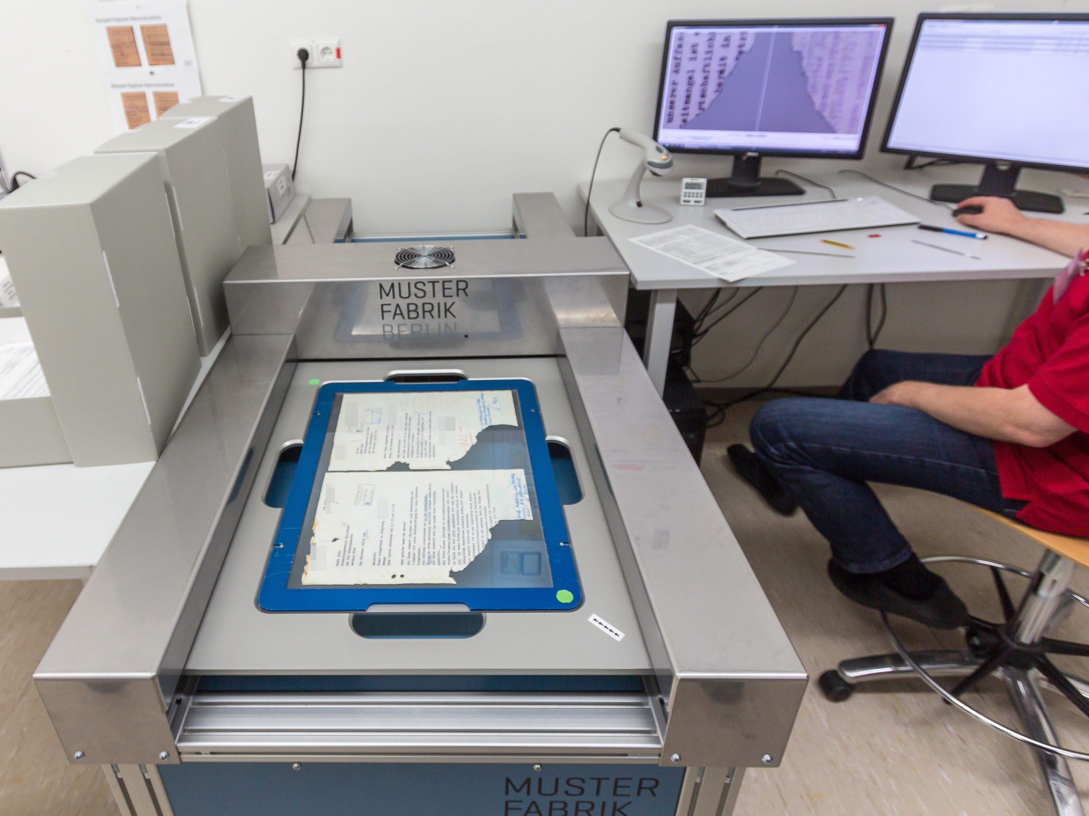 Scanner der Musterfabrik Berlin, mit der Dokumentenfragmente aus dem Einsturz des Historischen Archivs der Stadt Köln gescannt und an Hand der Risskanten automatisch wieder zusammengefügt werden sollen. Der Scanner steht im RDZ Porz